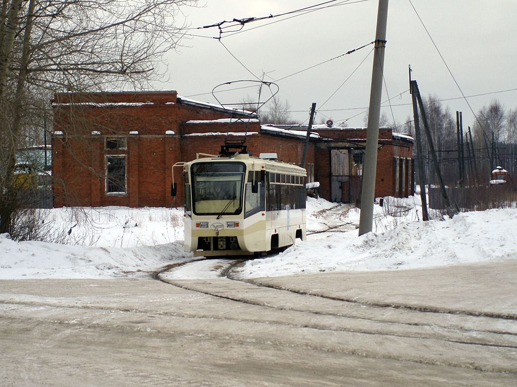 Волчанский 71-619КТ выезжает из депо на линию